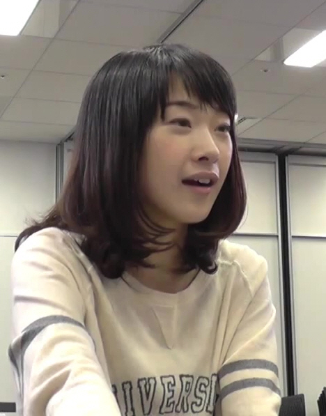 ガンダムトライエイジ プレイムービー特別版 PART3